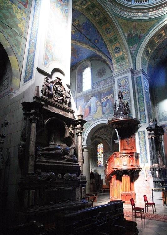 Polska